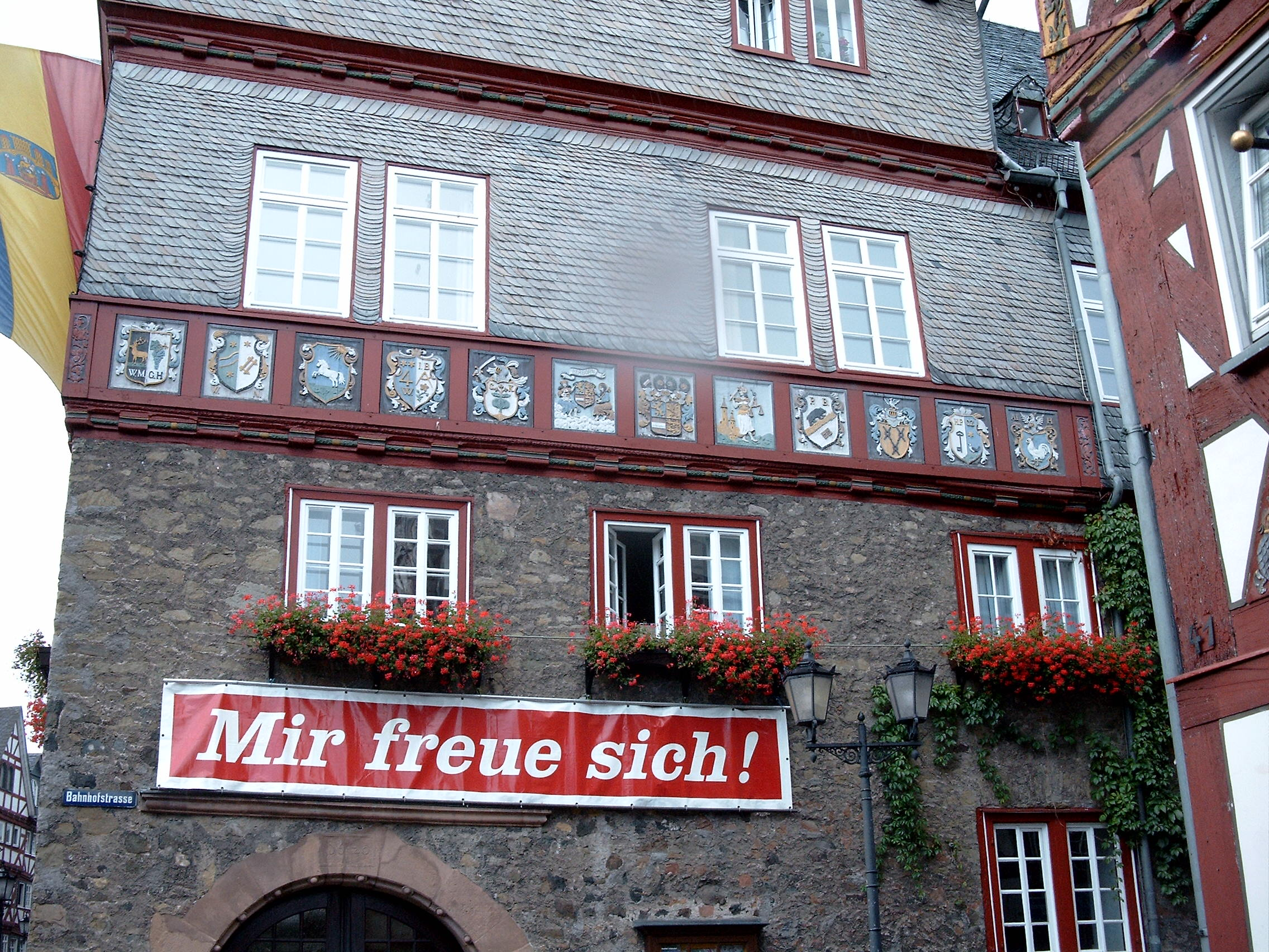 Herborn, Rathaus mit Wappenfries Die Fahne und das typisch hessische Transparent "Mir freue sich" wurden anlässlich eines Festes angebracht. Fotografiert von Thomas Porombka